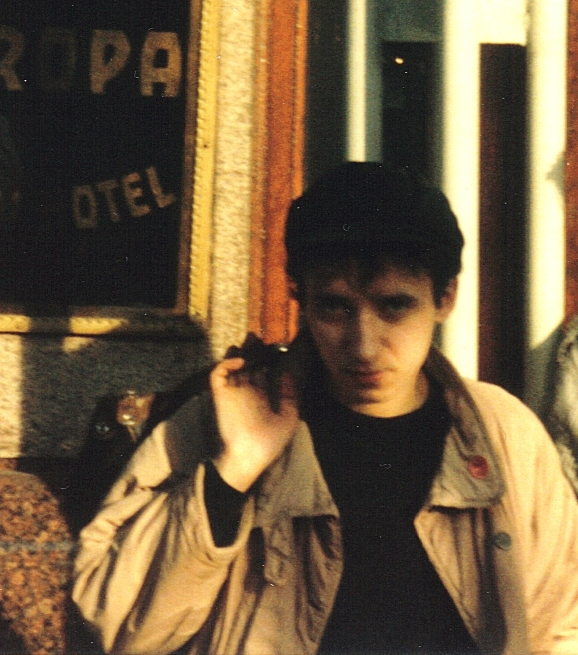 Sadakat Kadri in Prague, 1989